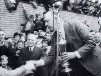 Karel Lotsy reikt de Nederlandse voetbalbeker in 1944 uit aan Henk Mes van Willem II.